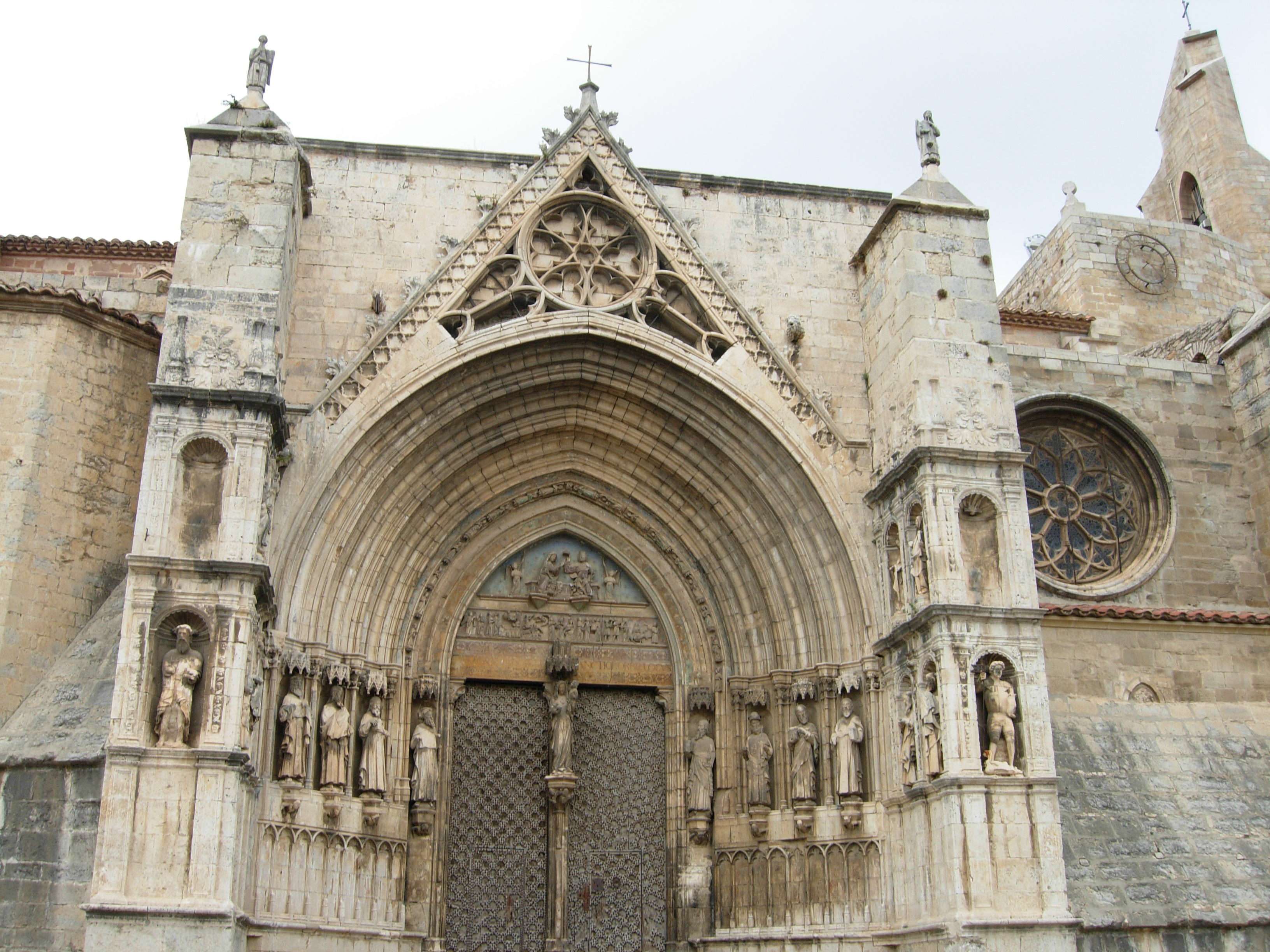 Morella - Puerta de la iglesia arciprestal.